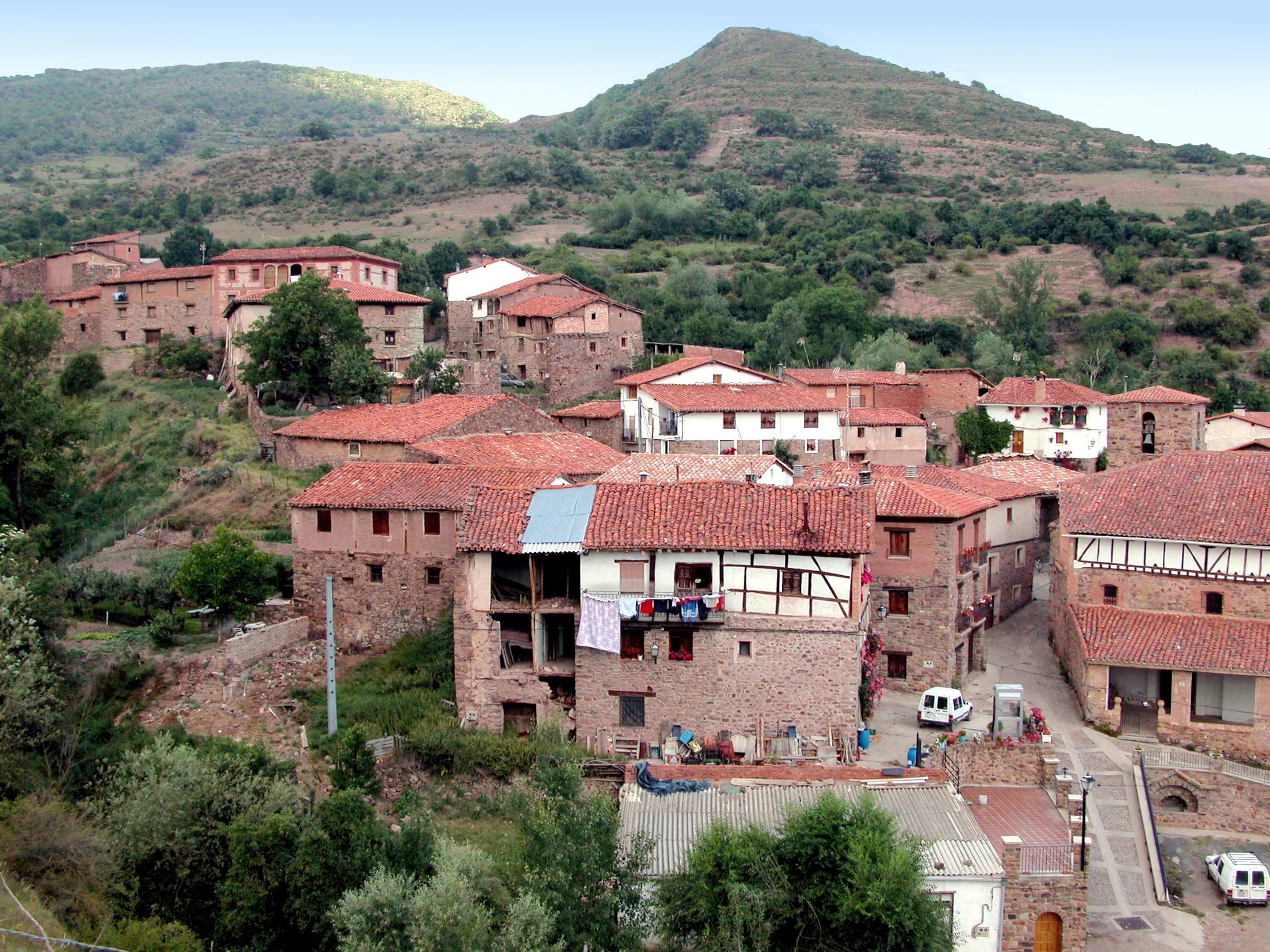 Vista general de Ajamil.